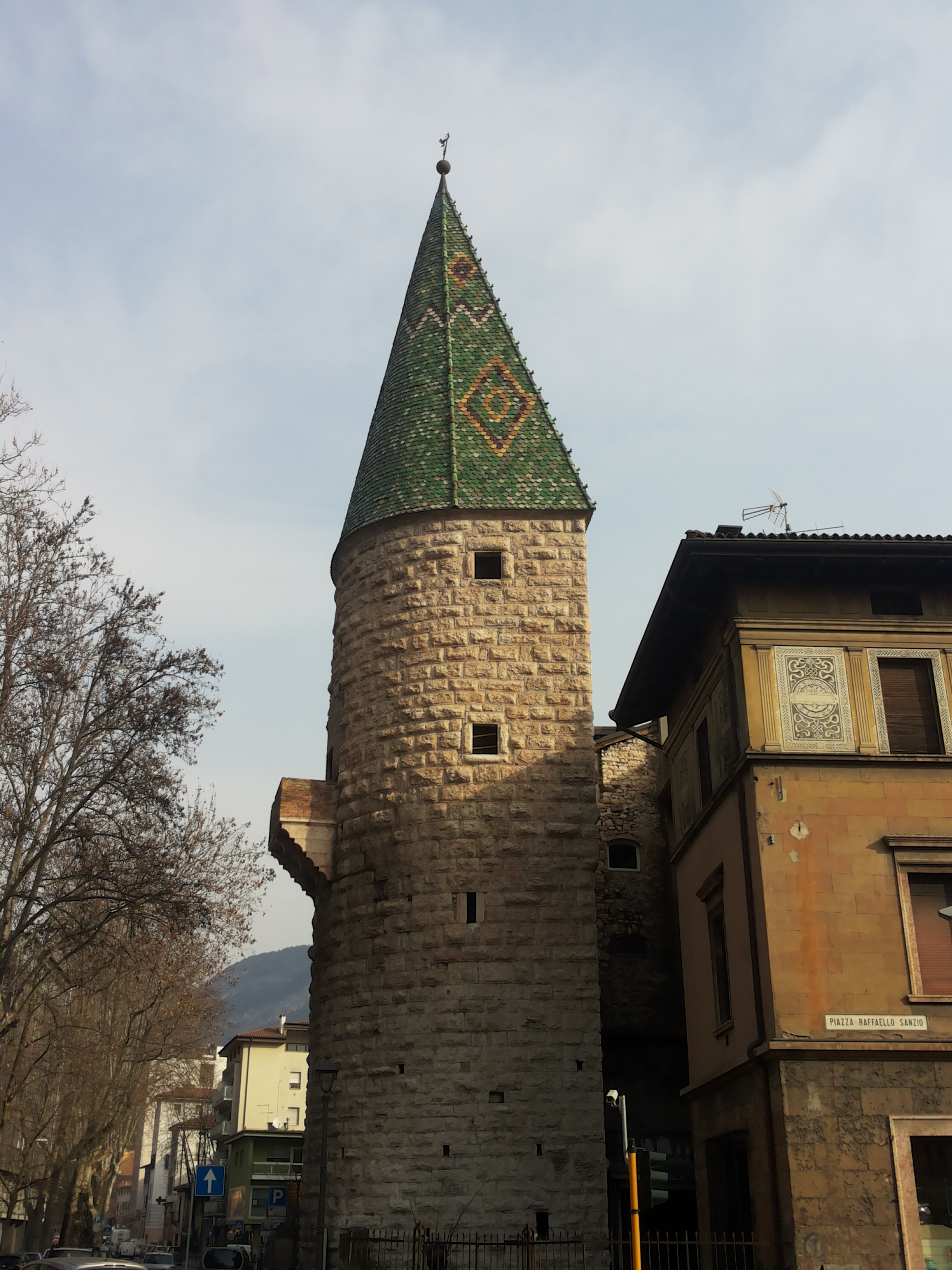 Torre Verde a Trento